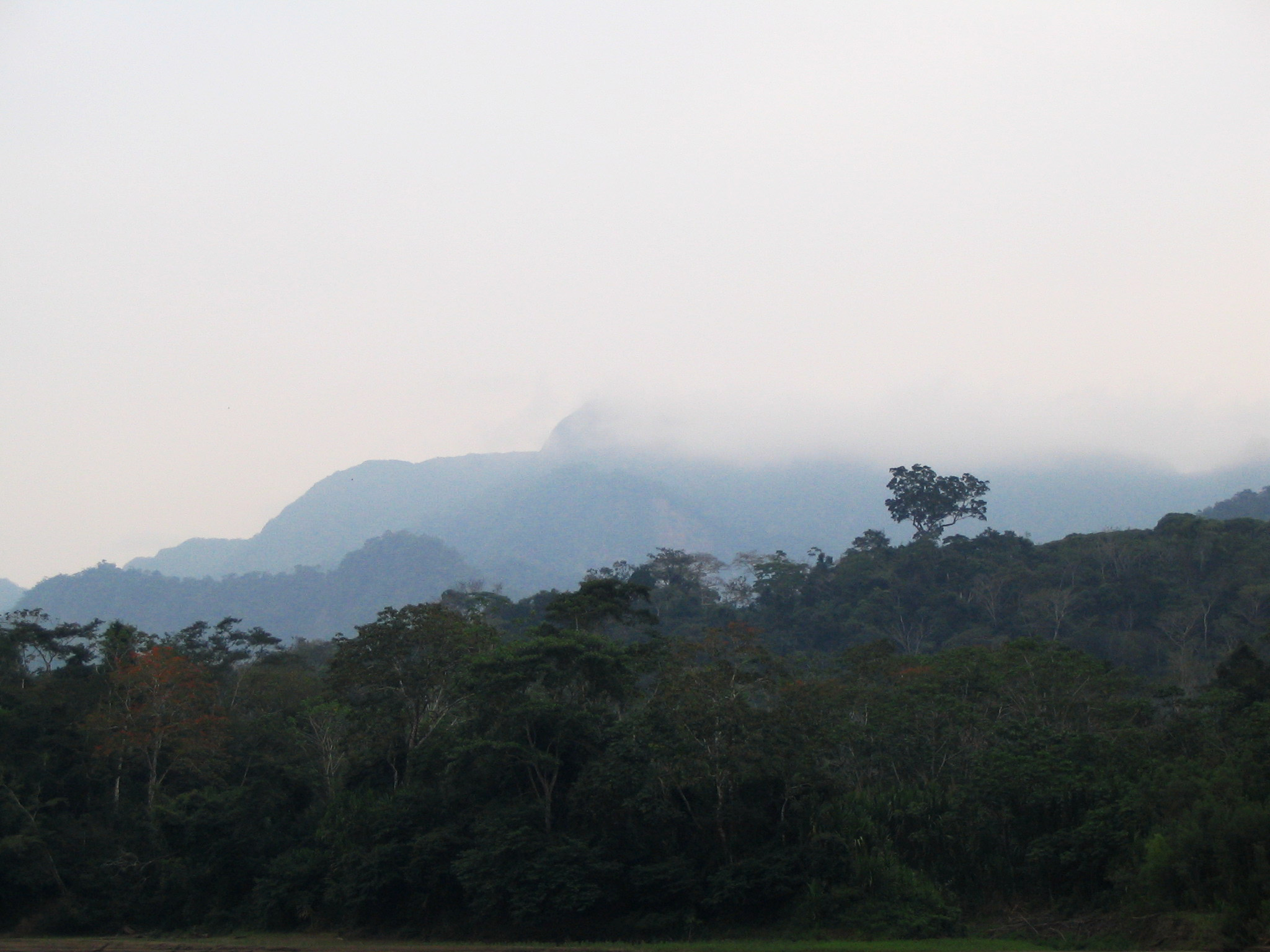 Amazonia cerca de Rurrenabaque, (La Paz - Bolivia)